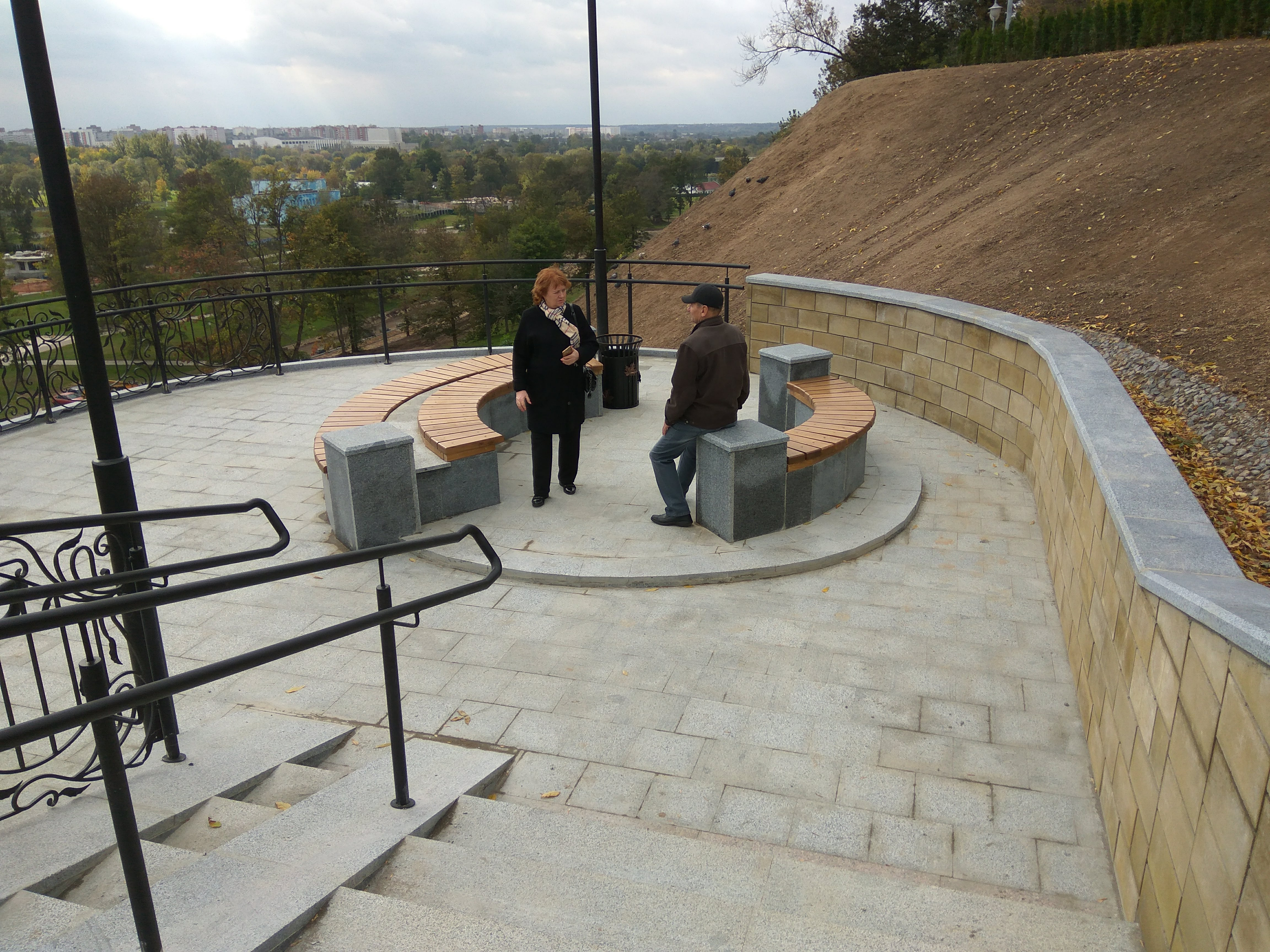 Магілёў. Лесвіца ў Падміколле